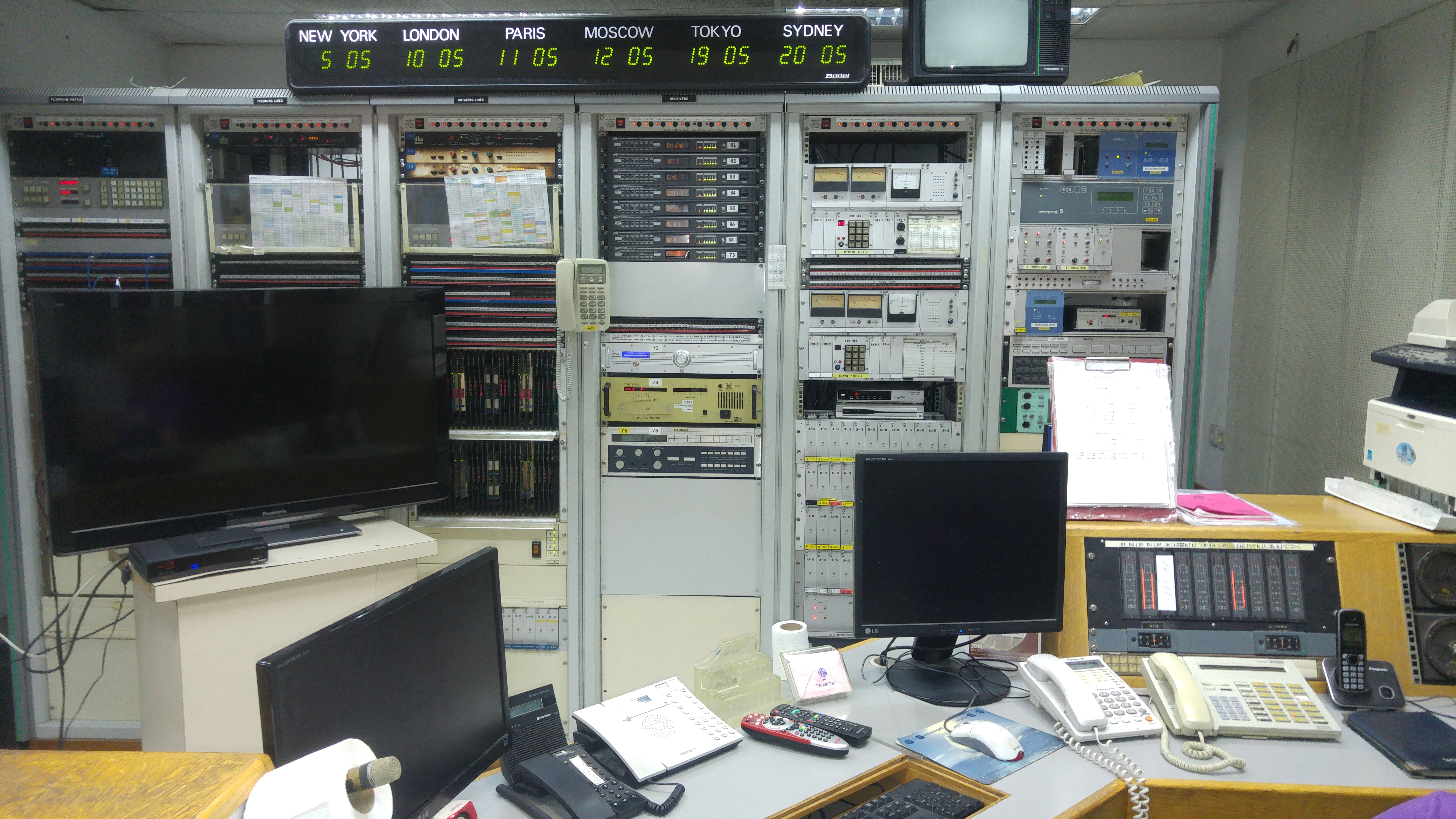 מתחם רשות השידור בתל אביב, ליד הקריה ומתחם שרונה.